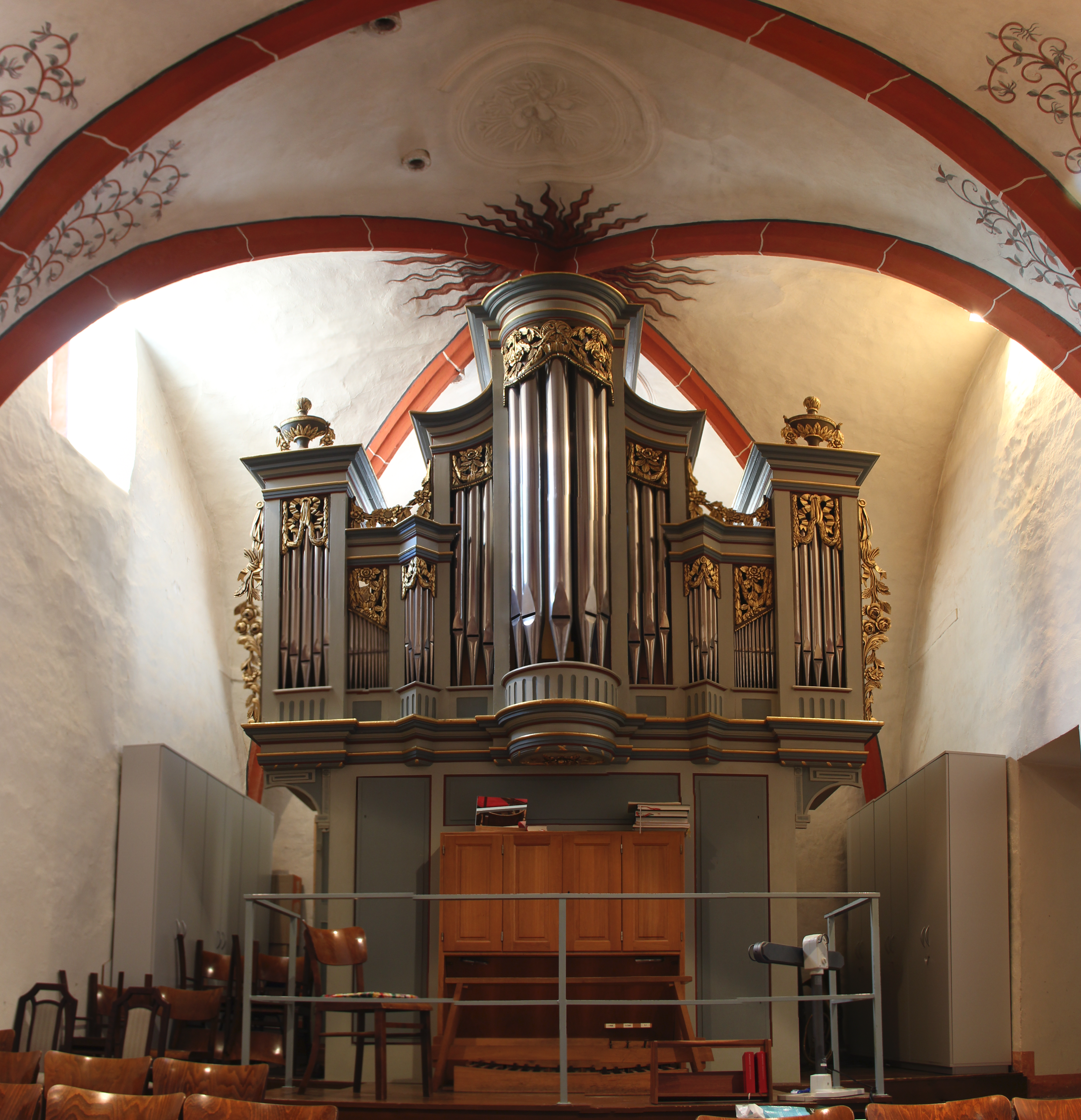 Innenaufnahme Martinskirche Gladenbach